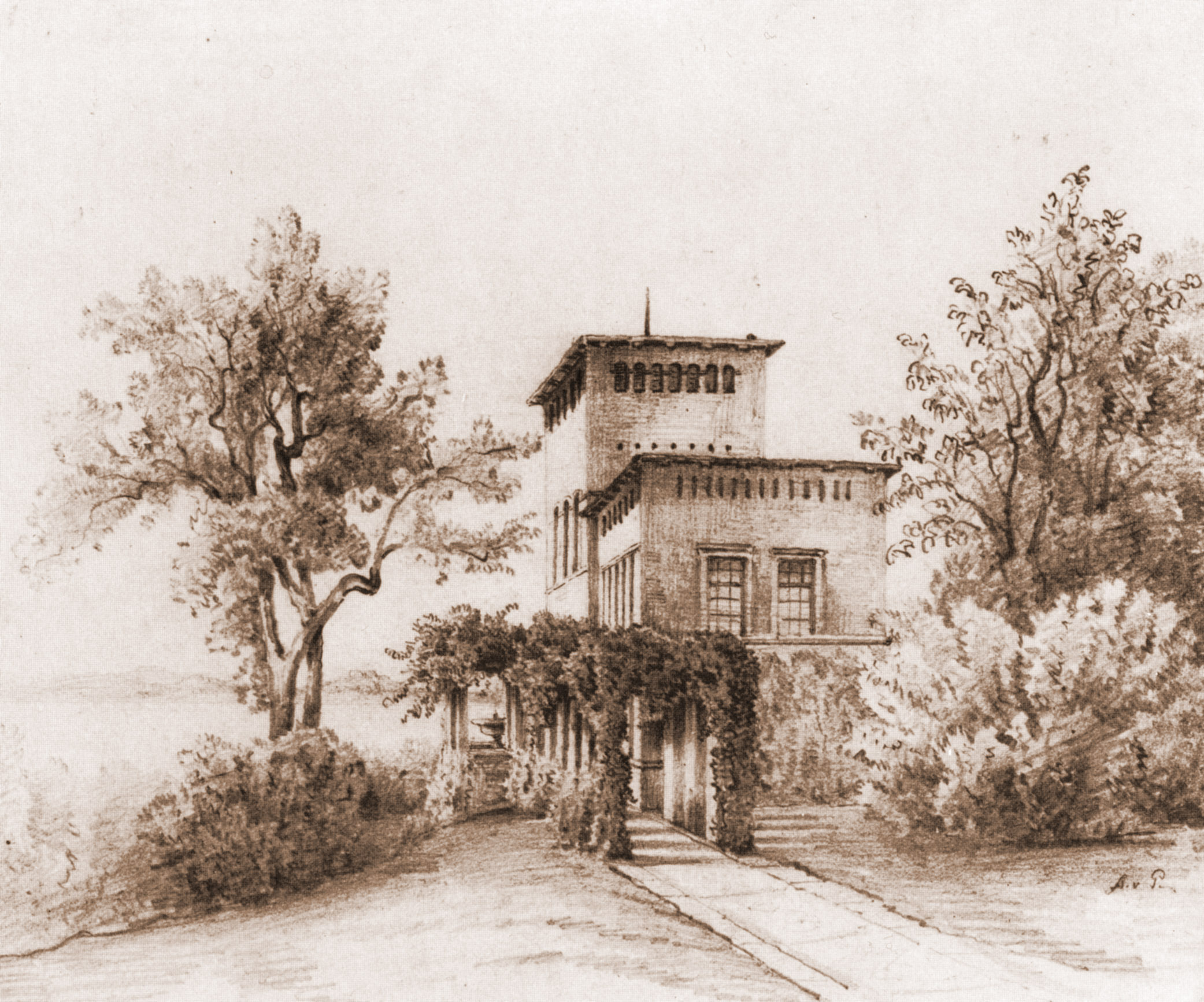 Hofgärtnerhaus von Ost (A. v. Parpart 1856)